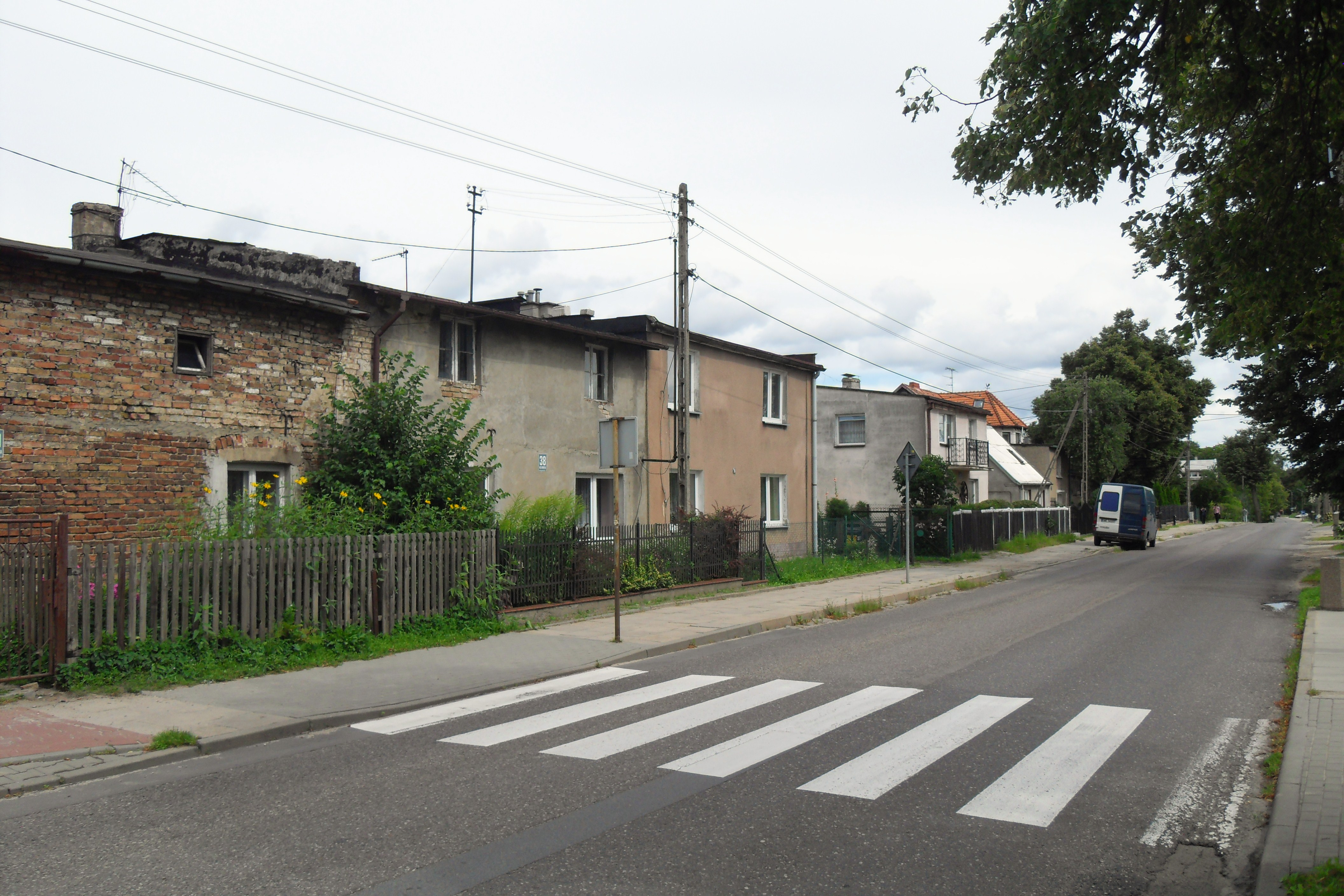 Gdańsk Wysoka, ul. Kielnieńska.